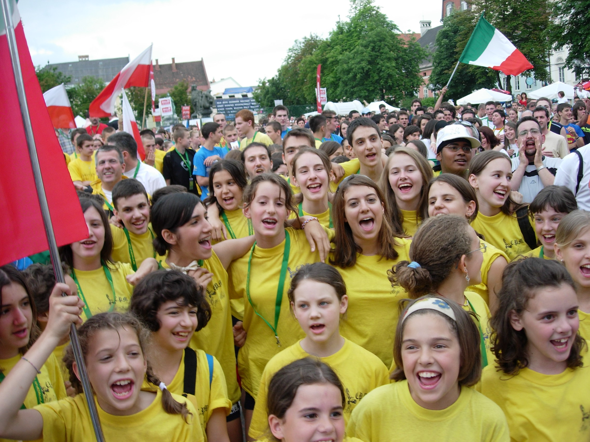 Teilnehmer der Eröffnungsfeier der UNITED WORLD GAMES 2005